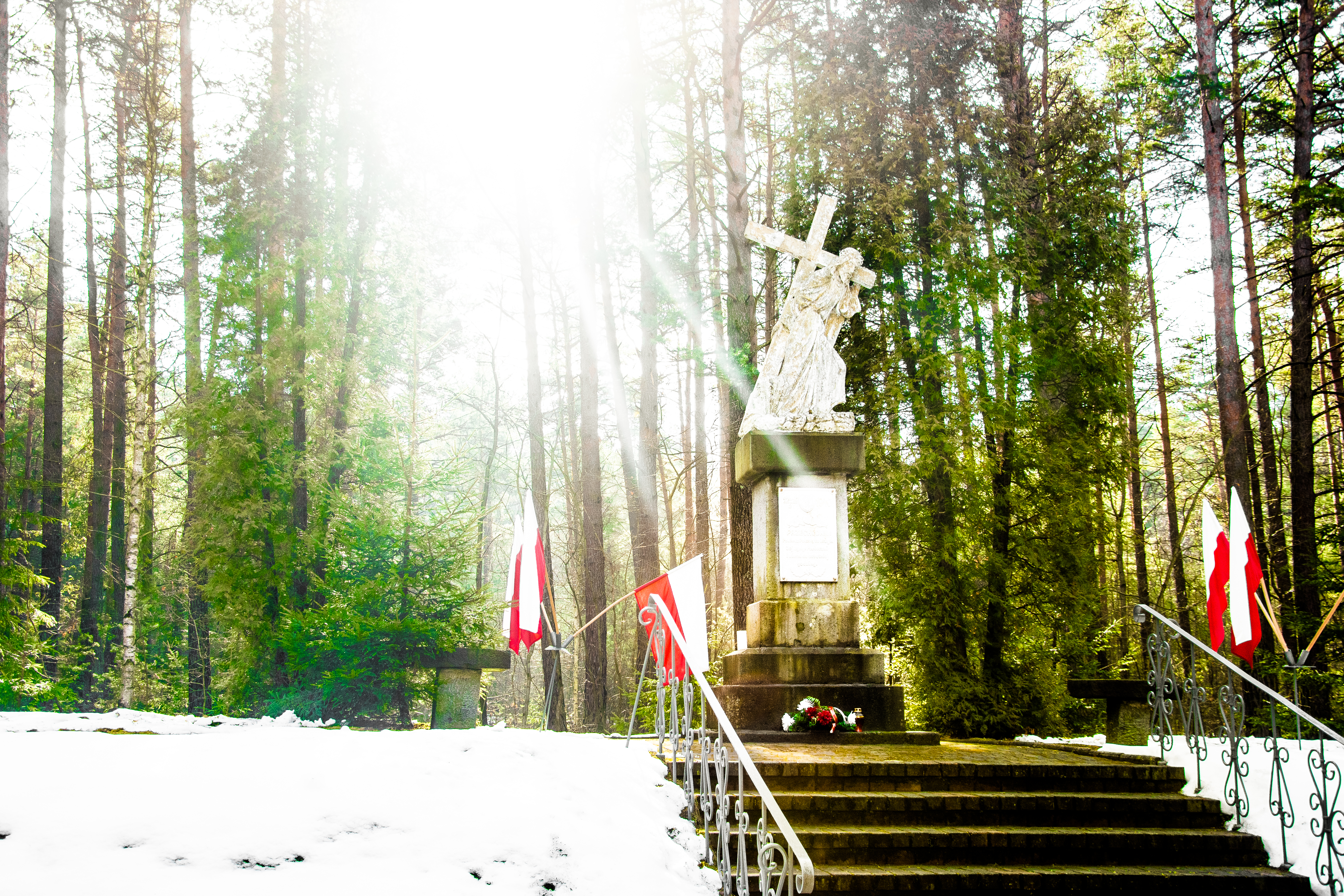 Mogiła zbiorowa w lesie na osiedlu Bór w Skarżysku-Kamiennej: pomnik z rzeźbą przedstawiającą Chrystusa dźwigającego krzyż. Na postumencie żeliwna tablica z datą masowej egzekucji skarżyszczan przez hitlerowców oraz napisem: „Przechodniu! Powiedz Polsce, tu leżym, Jej syny: posłuszni i wierni do ostatniej godziny”.